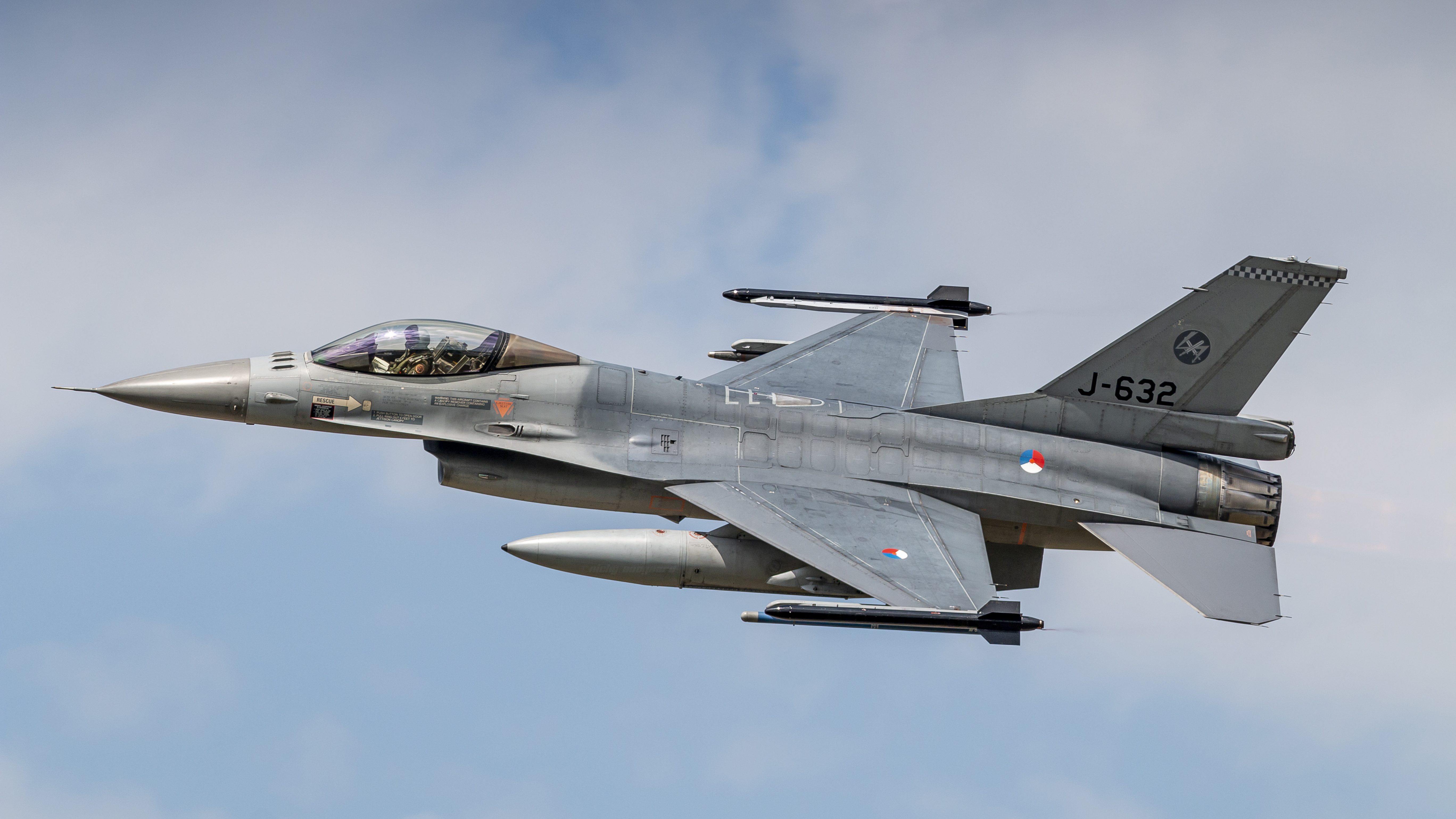 Volkel Airbase